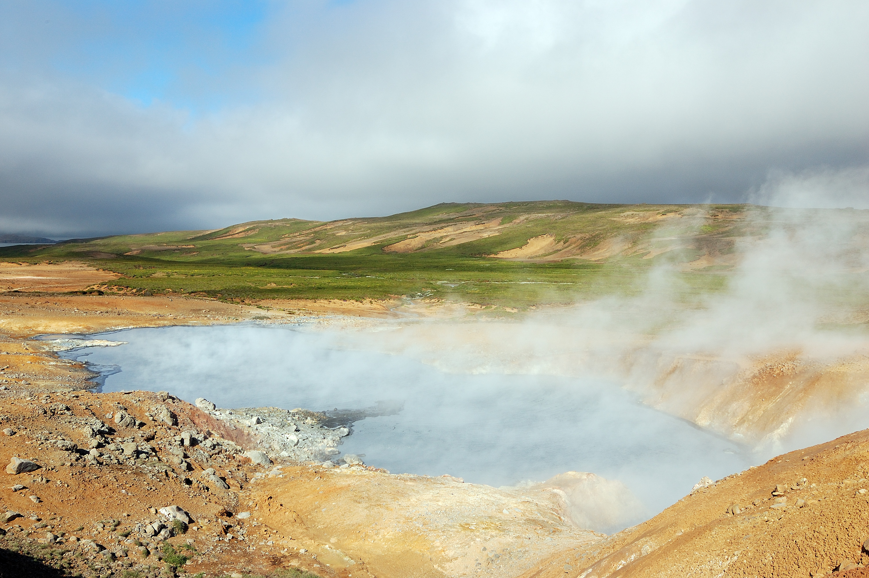 Krýsuvík, Iceland [2008]